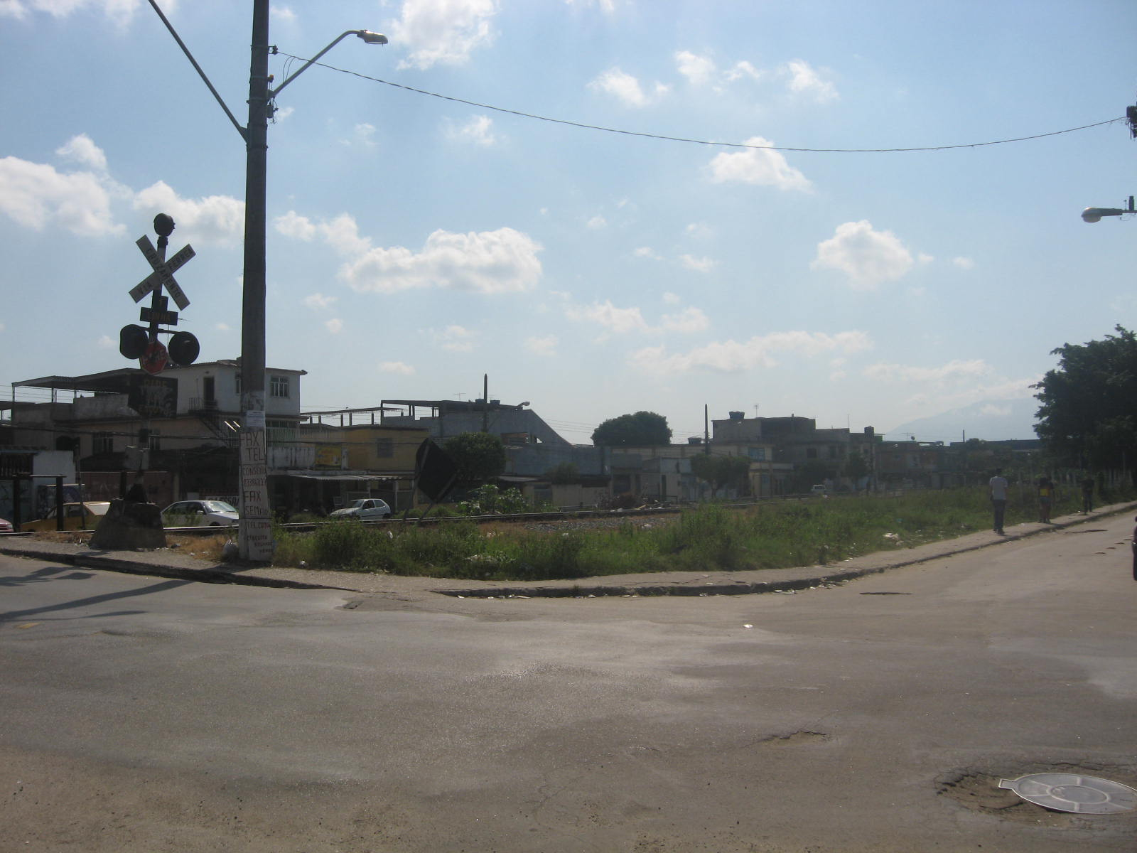 Bairro do Éden, localizado em São João de Meriti.